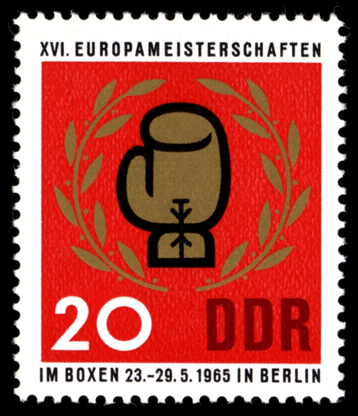 Information Information: Ausgabepreis: Pfennig First Day of Issue / Erstausgabetag: Auflage: Entwurf: Druckverfahren: Michel-Katalog-Nr: Ländercode-MiNr